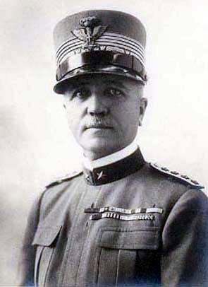 Badoglio